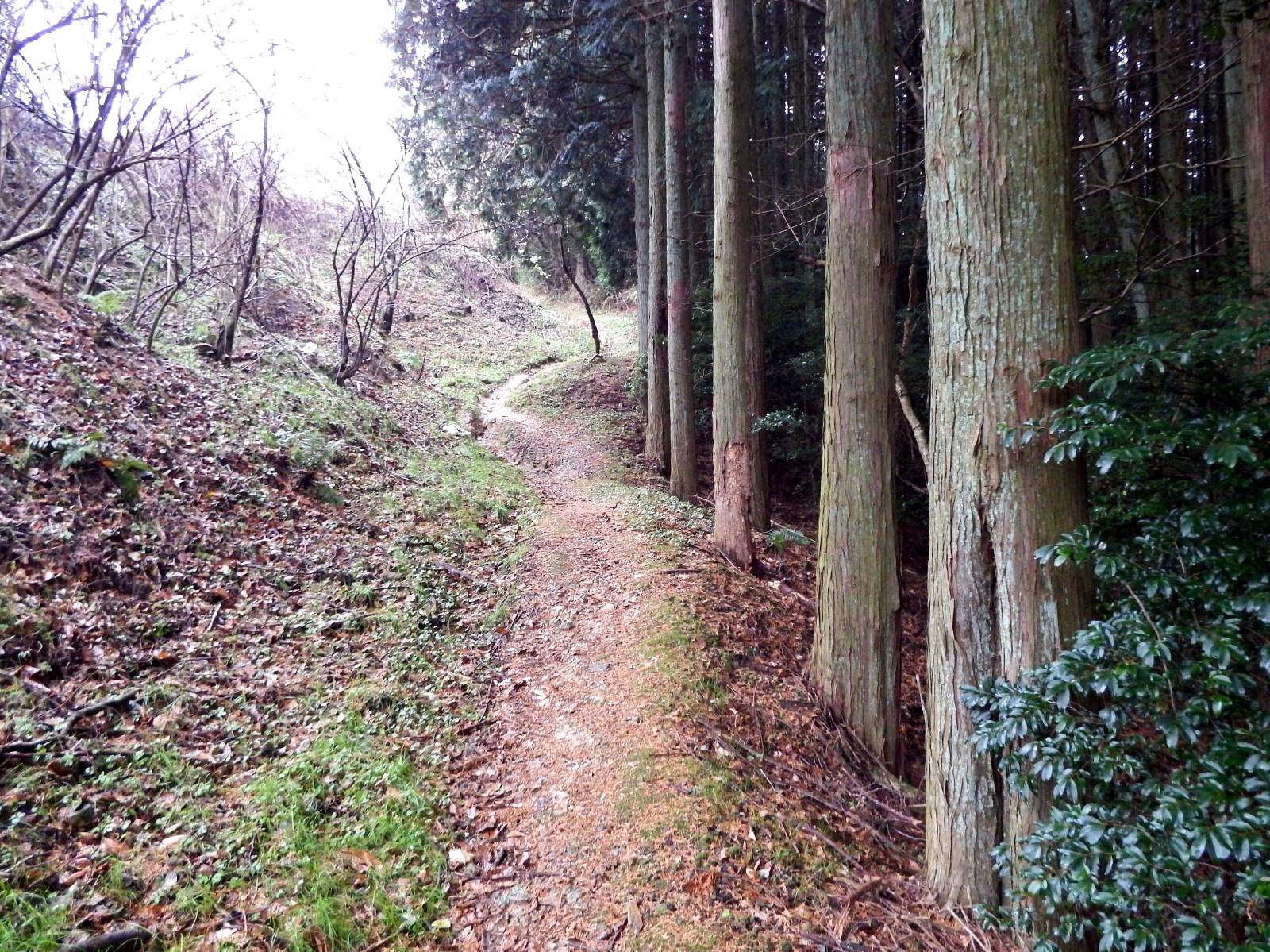 遍路道 雲辺寺道